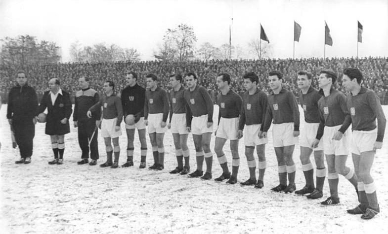 Zentralbild-Schaar 13.12.1959 SC Dynamo Berlin FDGB-Pokal-Sieger Im Leipziger Bruno-Plache-Stadion konnte sich am 13.12.59 der SC Dynamo Berlin im zweiten Spiel um den FDGB-Pokal gegen den SC Wismut Karl-Marx-Stadt, Deutscher Fußballmeister 1959 mit 3:2 Toren durchsetzen. UBz: Die Mannschaft des SC Dynamo Berlin, FDGB-Pokal-Sieger 1959. V.r.n.l.: Bley, Quest, (nach der Pause spielte für ihn Schäffner), Skaba, Börner, Hofmann, Maschke, Mühlbücher, Thiemann, Heine, Torwart Marquardt und Mannschaftskapitän Moppel Schröter.